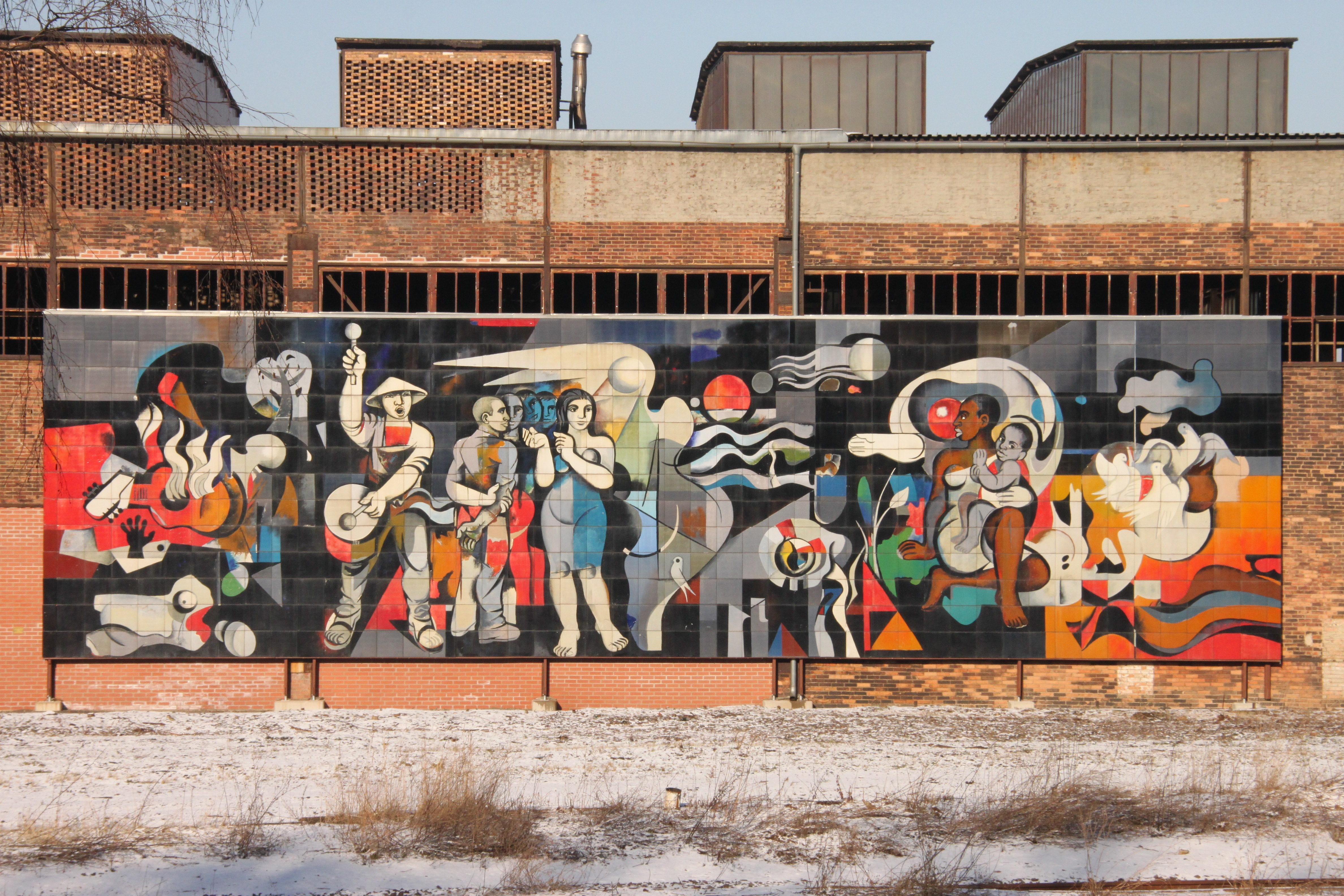 Email-Wandbild in der Nähe des sachsen-anhaltinischen Bahnhofs Thale